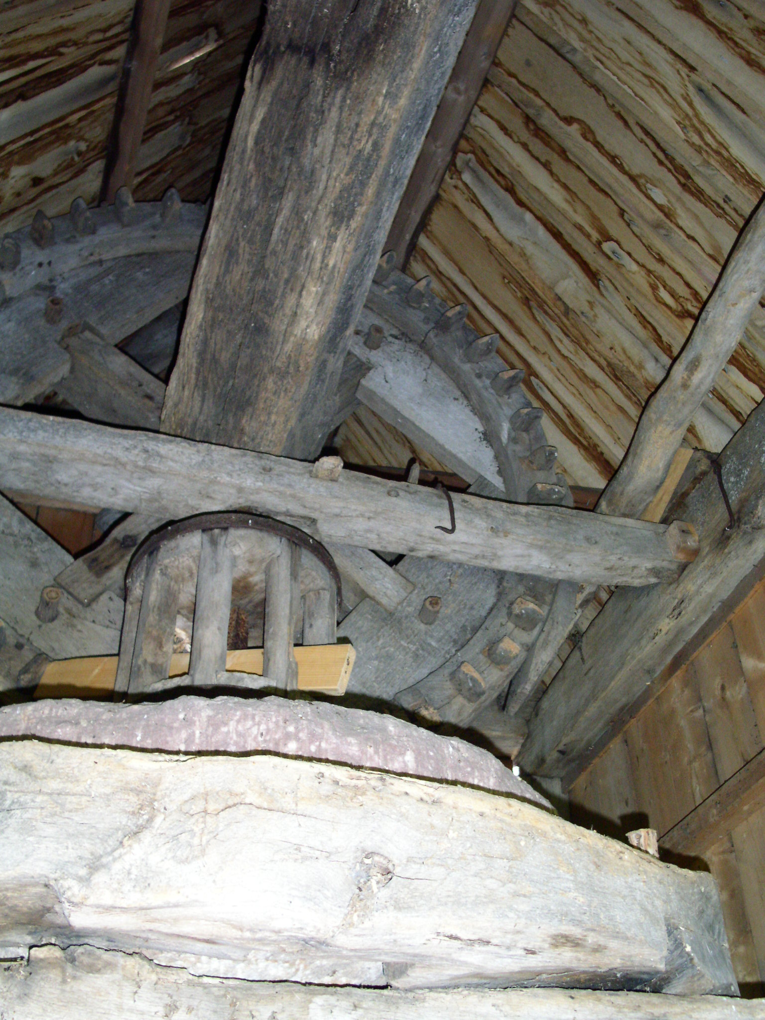 del av maskineriet i en liten ölänsk stubbkvarn i Långlöt socken. På bilden syns nerifrån Mjölkar, Löpare, Trella, Kronhjul, Gångås.